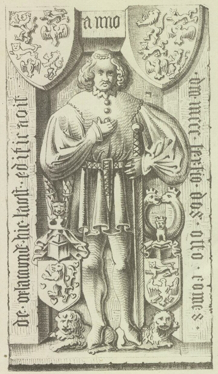 Bildunterschrift: Grabstein von Graf Otto X. von Orlamuende zu Lauenstein, Lichtenberg, Madala, Greaefnthal Schauenforst / gest. 1403 zu Ludwigstadt